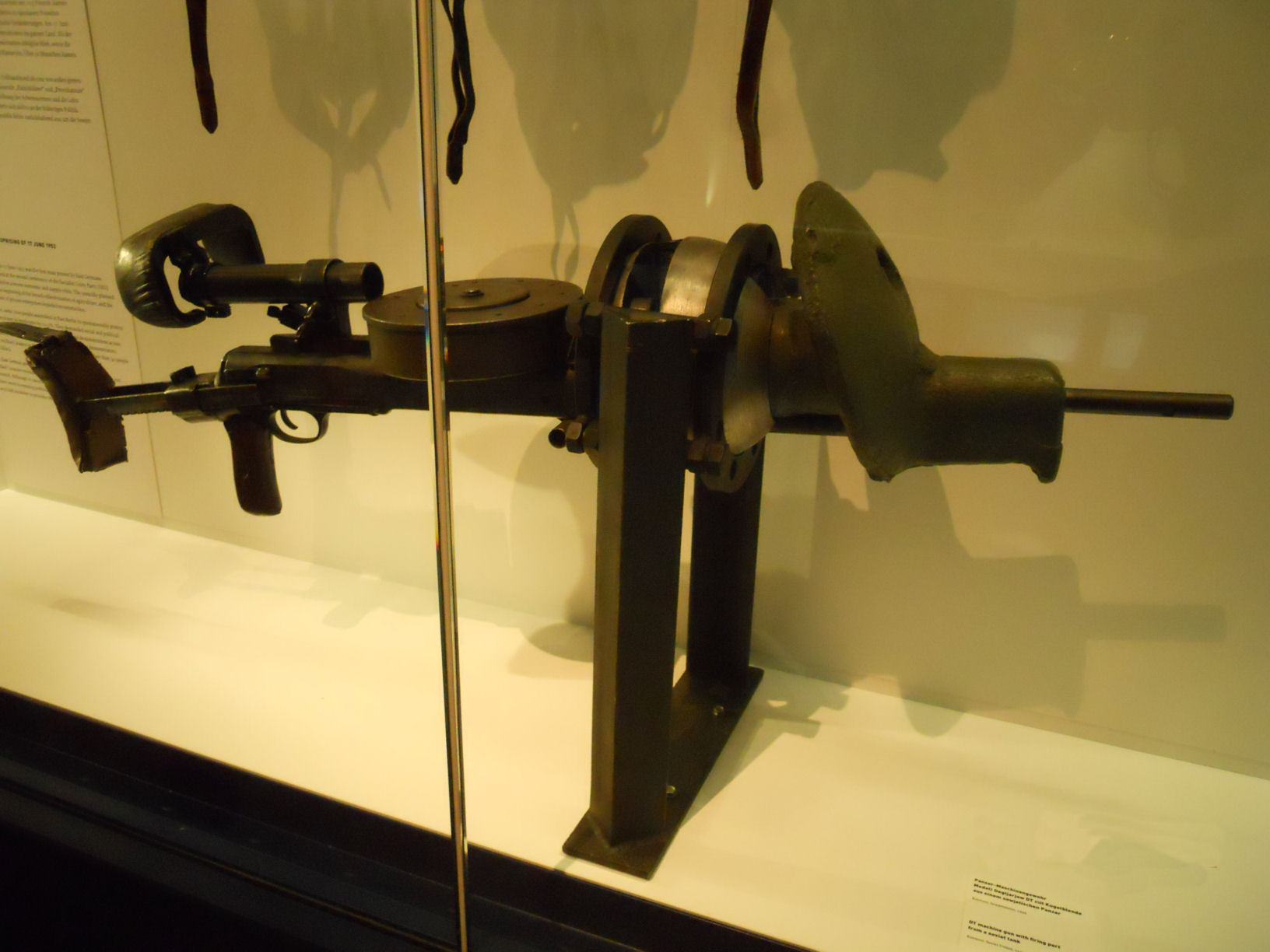 russ. Maschinengewehr DT mit Kugelblende